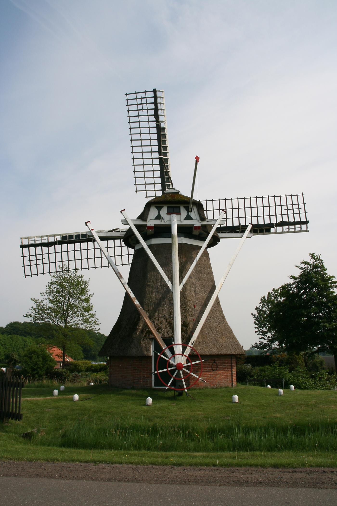 Slochteren: Fraeylemamolen, gezien vanaf de Groenedijk